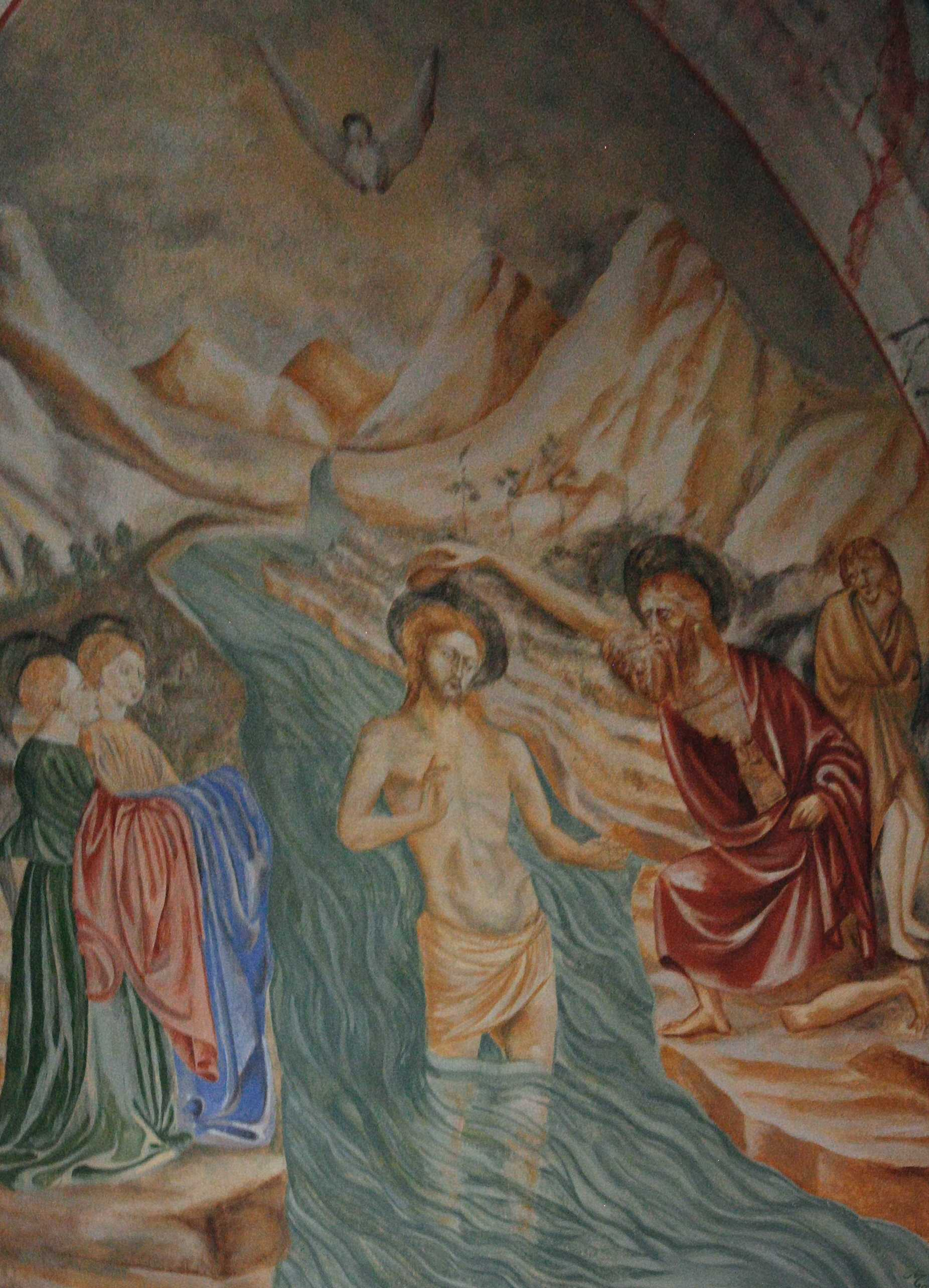 Église Saint Blaise de Labastide-de-Lévis : Le Baptême. Peint en 1825 par Jean Bozia, artiste italien.